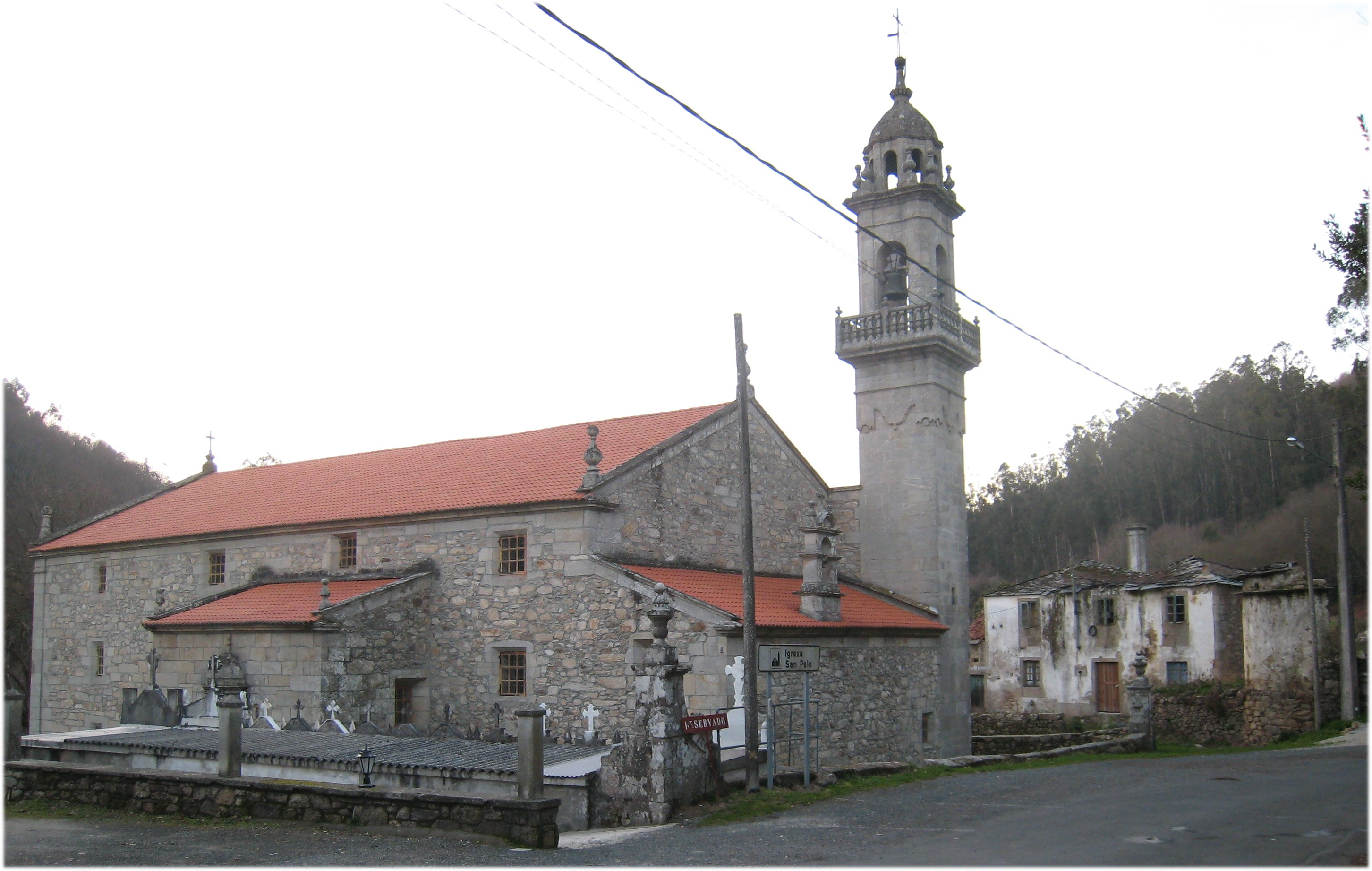 Igrexa parroquial de San Paio de Aranga